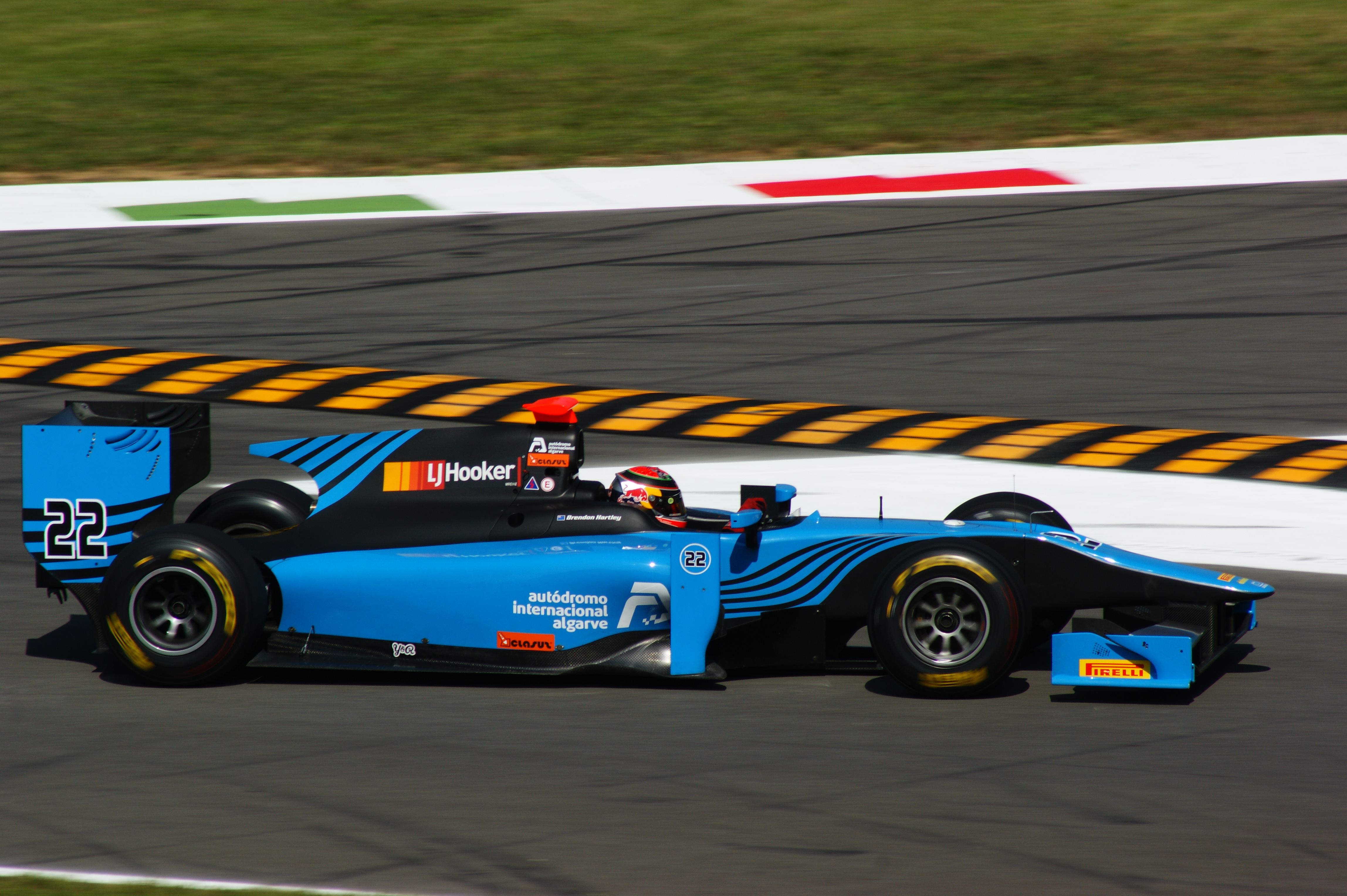 Brendon Hartley alla prima variante Monza 2011